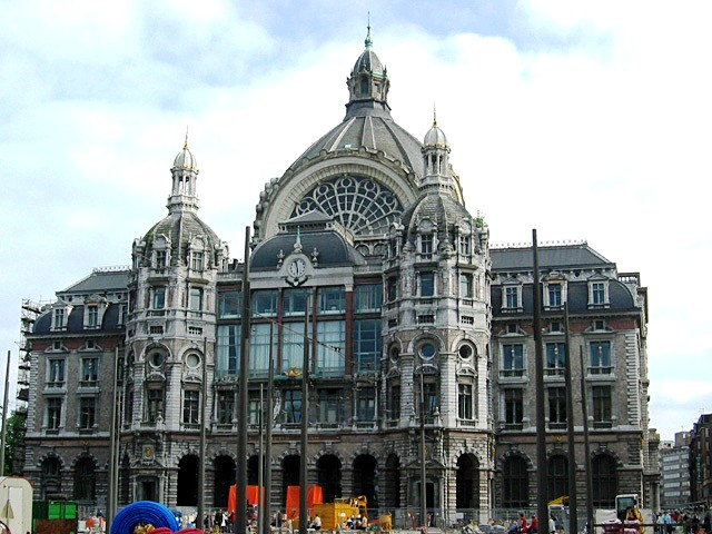 Station Antwerpen-Centraal (de Spoorwegkathedraal) gezien vanop het Astridplein